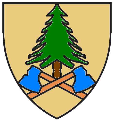 Wappen Vorlage, Bärnkopf, Niederösterreich, Austria